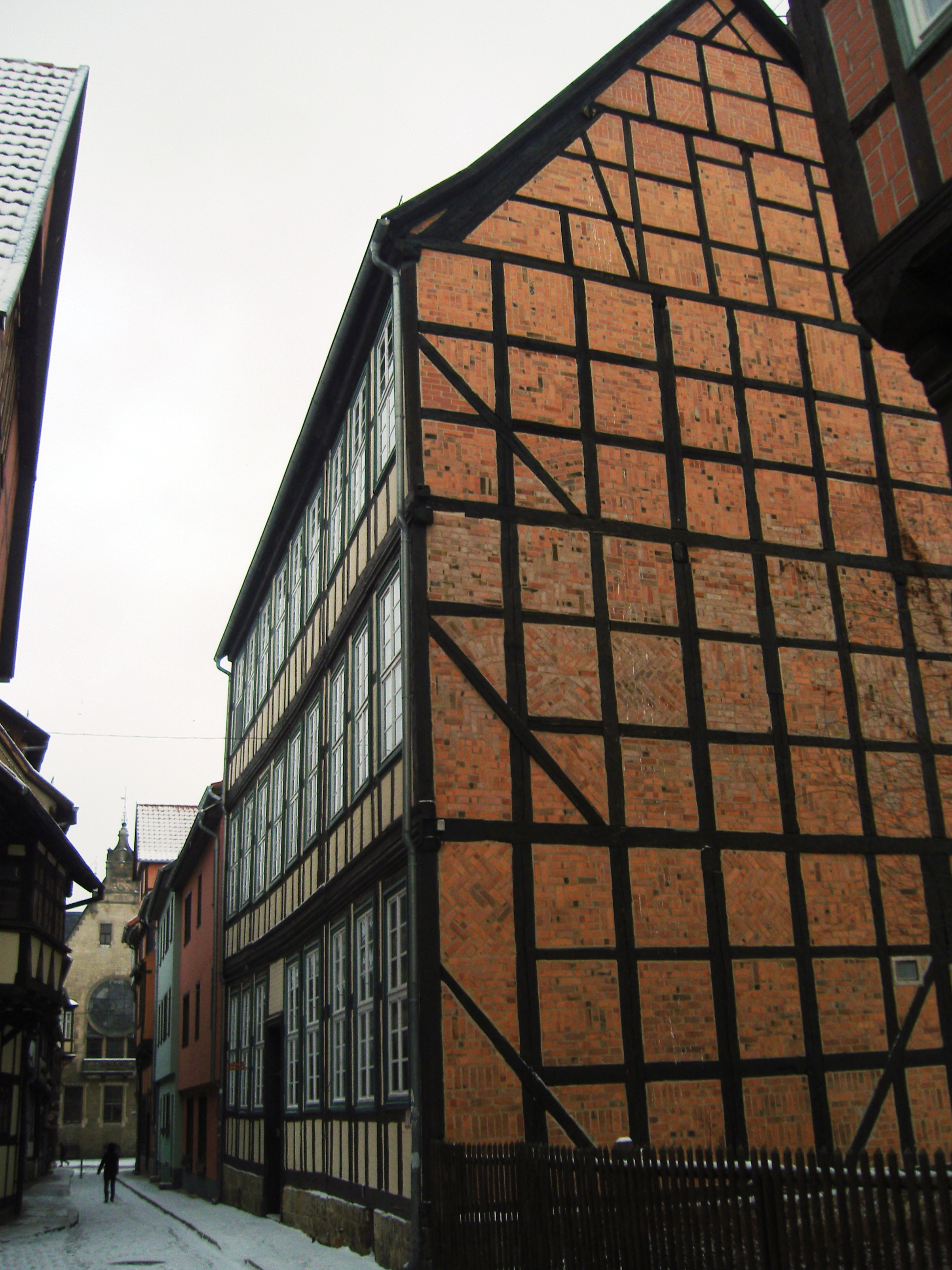 Denkmalgeschütztes Wohnhaus in der Straße Stieg 4 in Quedlinburg